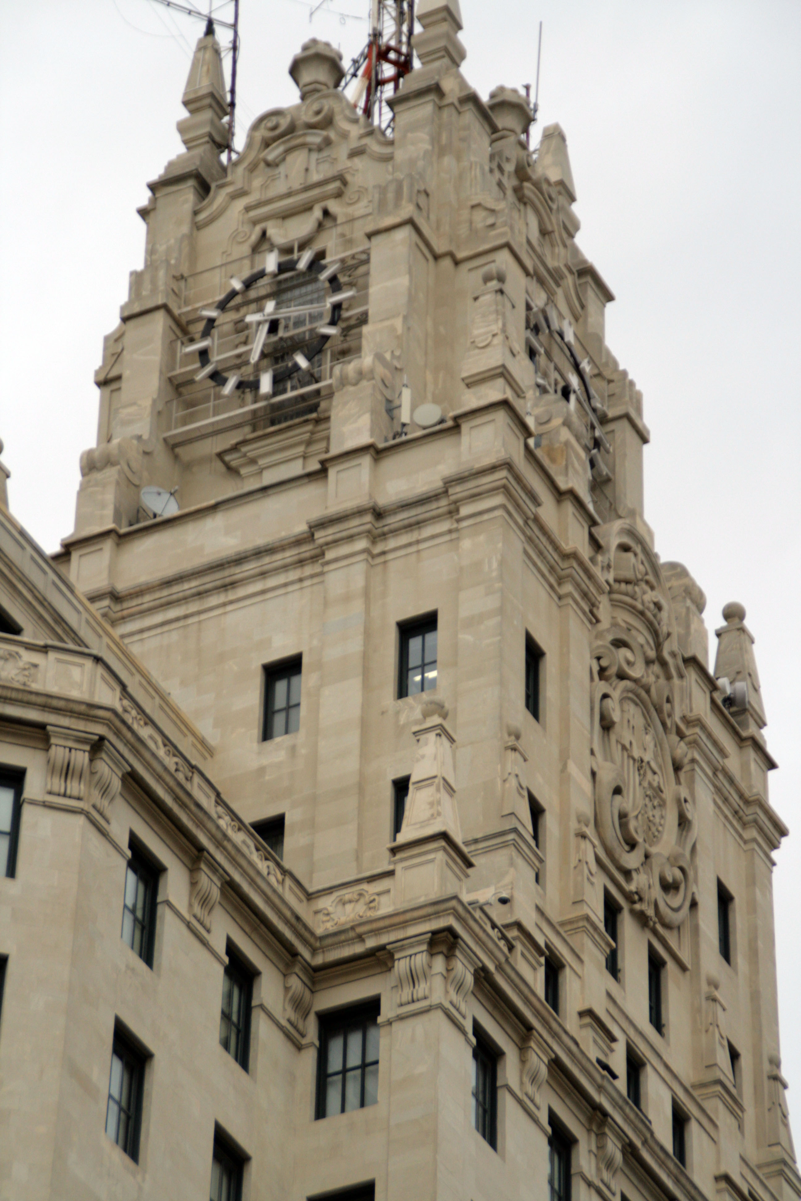 Parte superior del Edificio Telefónica en Madrid (España).